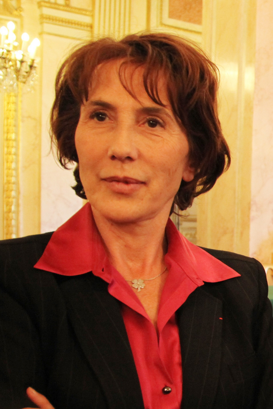 Chantal Brunel en avril 2009.